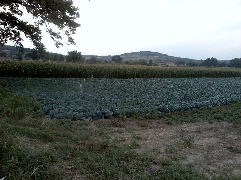 Поље засејано купусом и кукурузом у Жировници Licensing